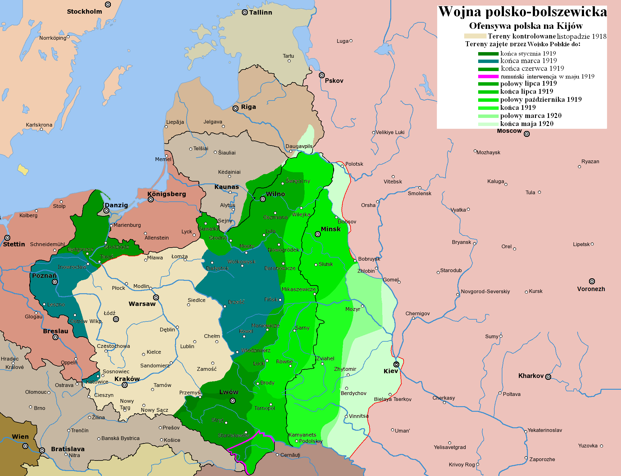 etapy ofensywy polskiej na Kijów w 1919/20